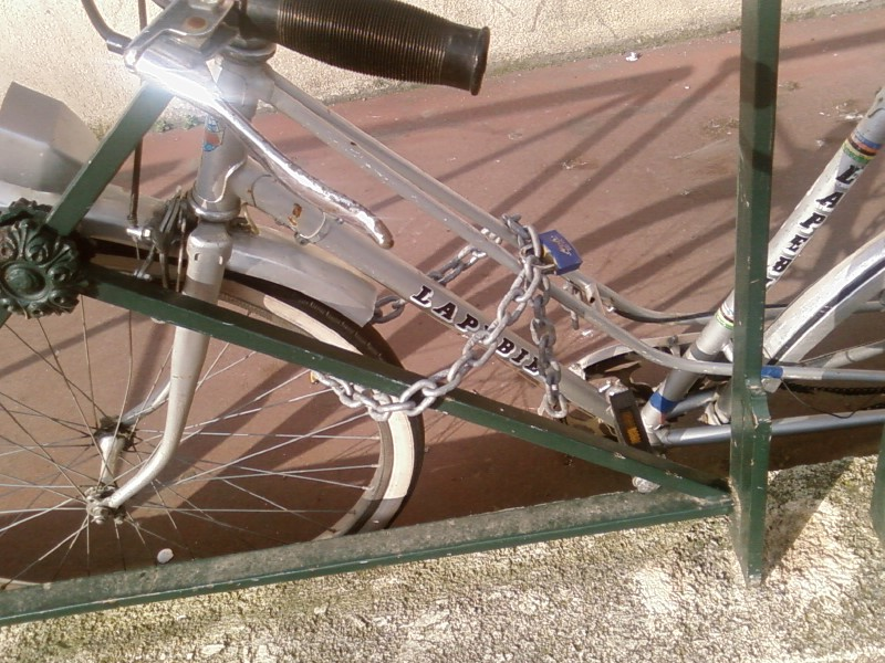 Antivol de vélo type "chaine"